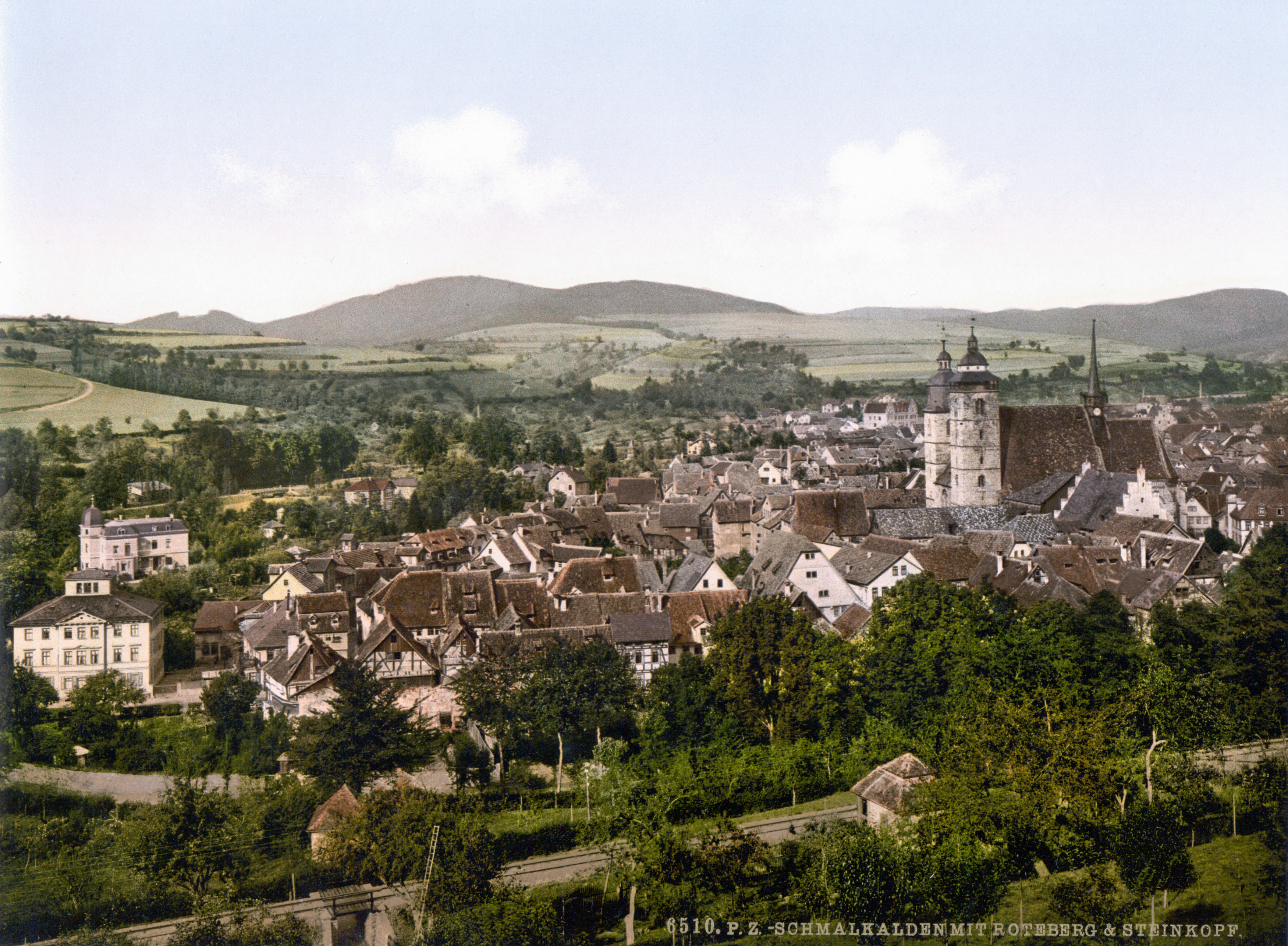 Schmalkalden mit Roteberg und Steinkopf um 1900